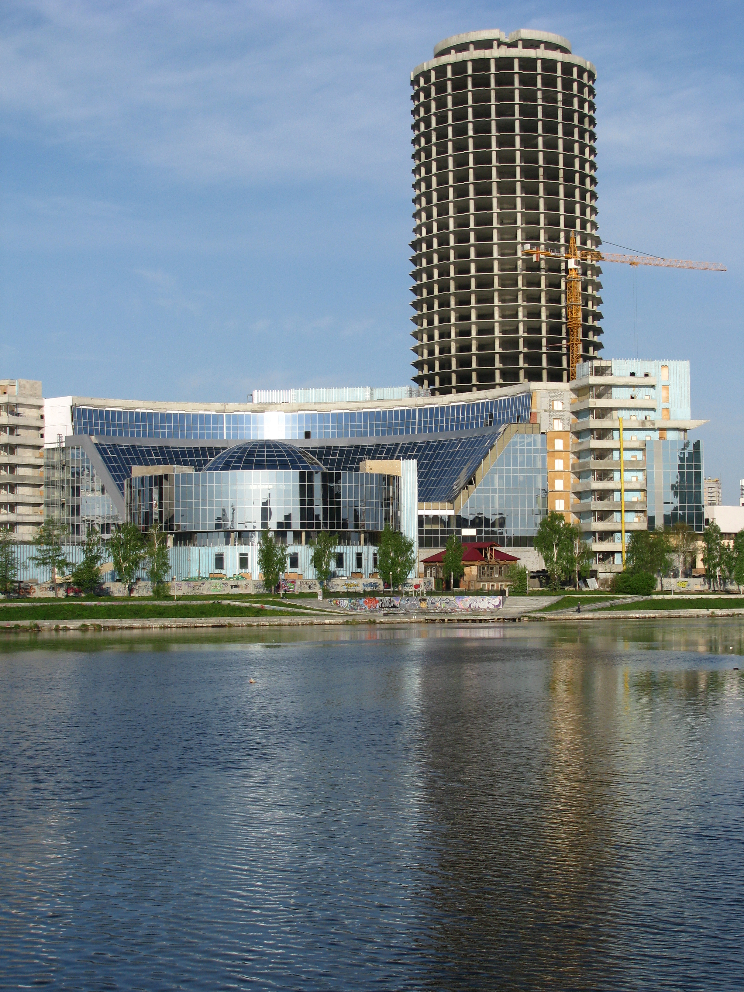 Строящийся бизнес-центр «Демидов» с конгресс-холлом.